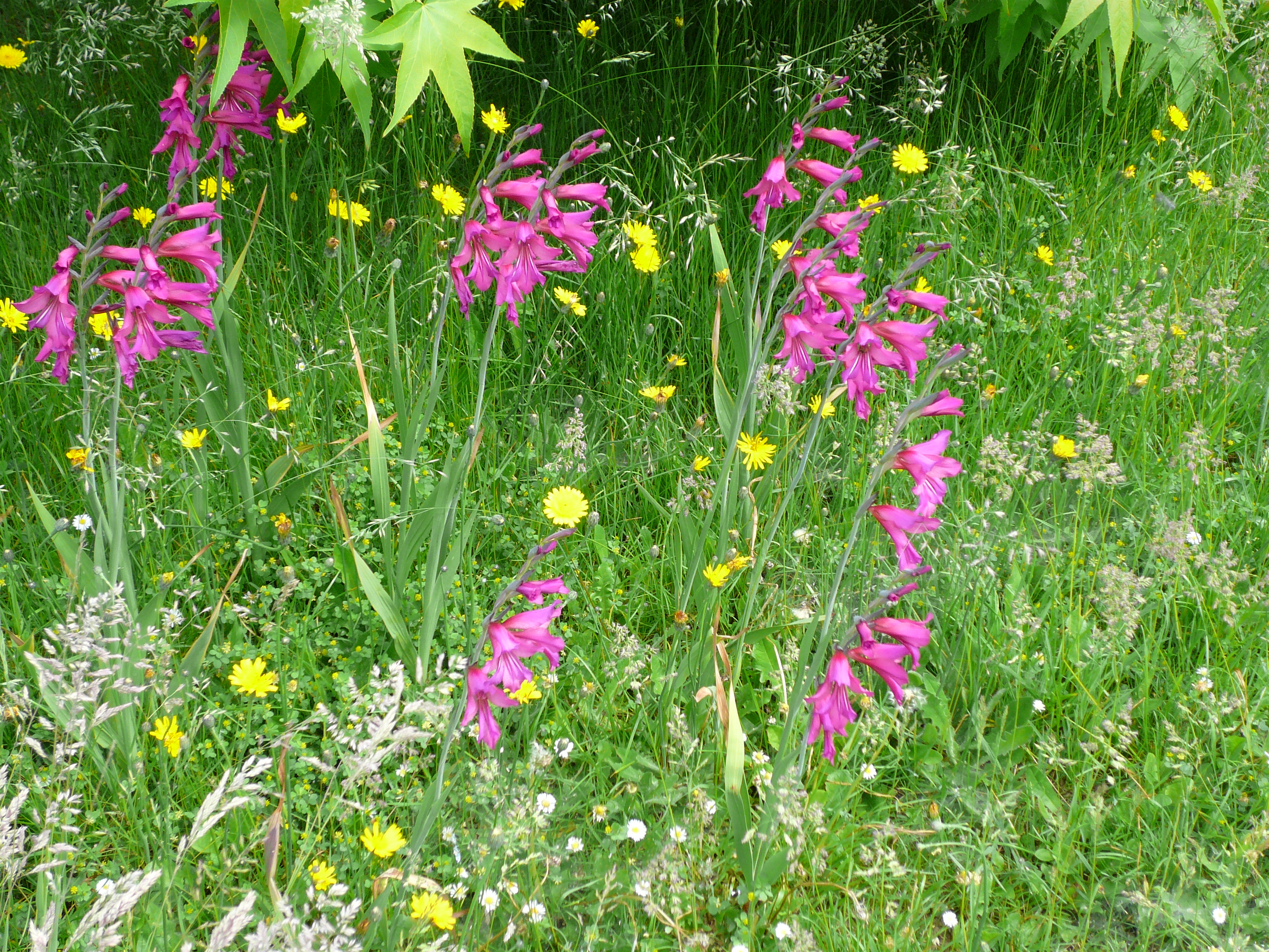 Gladiolus communis subsp. byzantinus dans mon jardin